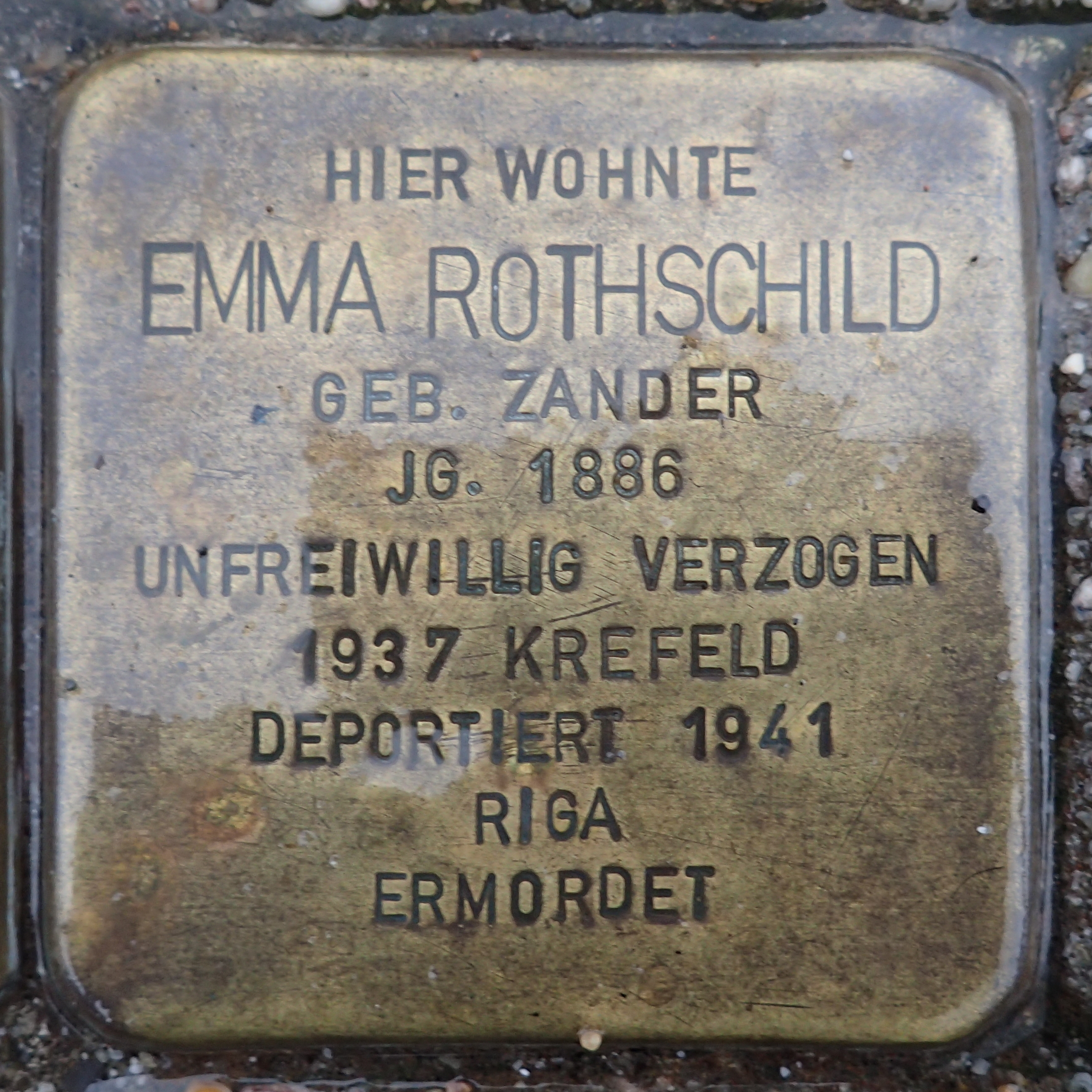 Stolperstein Geldern Brühlscher Weg 27 Emma Rothschild